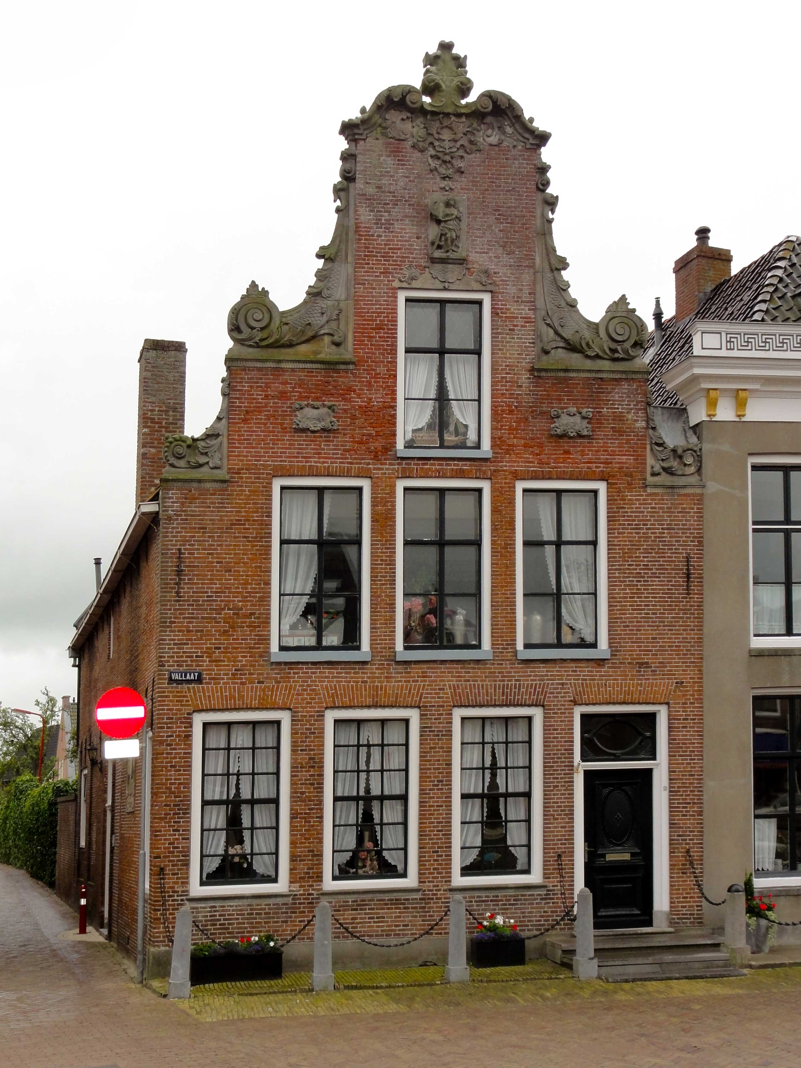 Vallaat 22 te Makkum